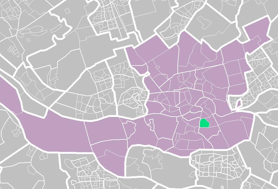 Rotterdam districts/neighboorhoods